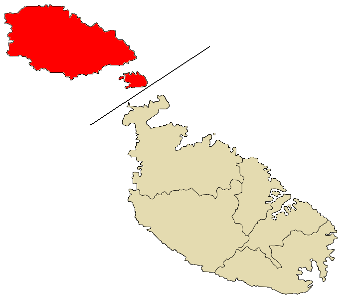 Distrito de Gozo y Comino.